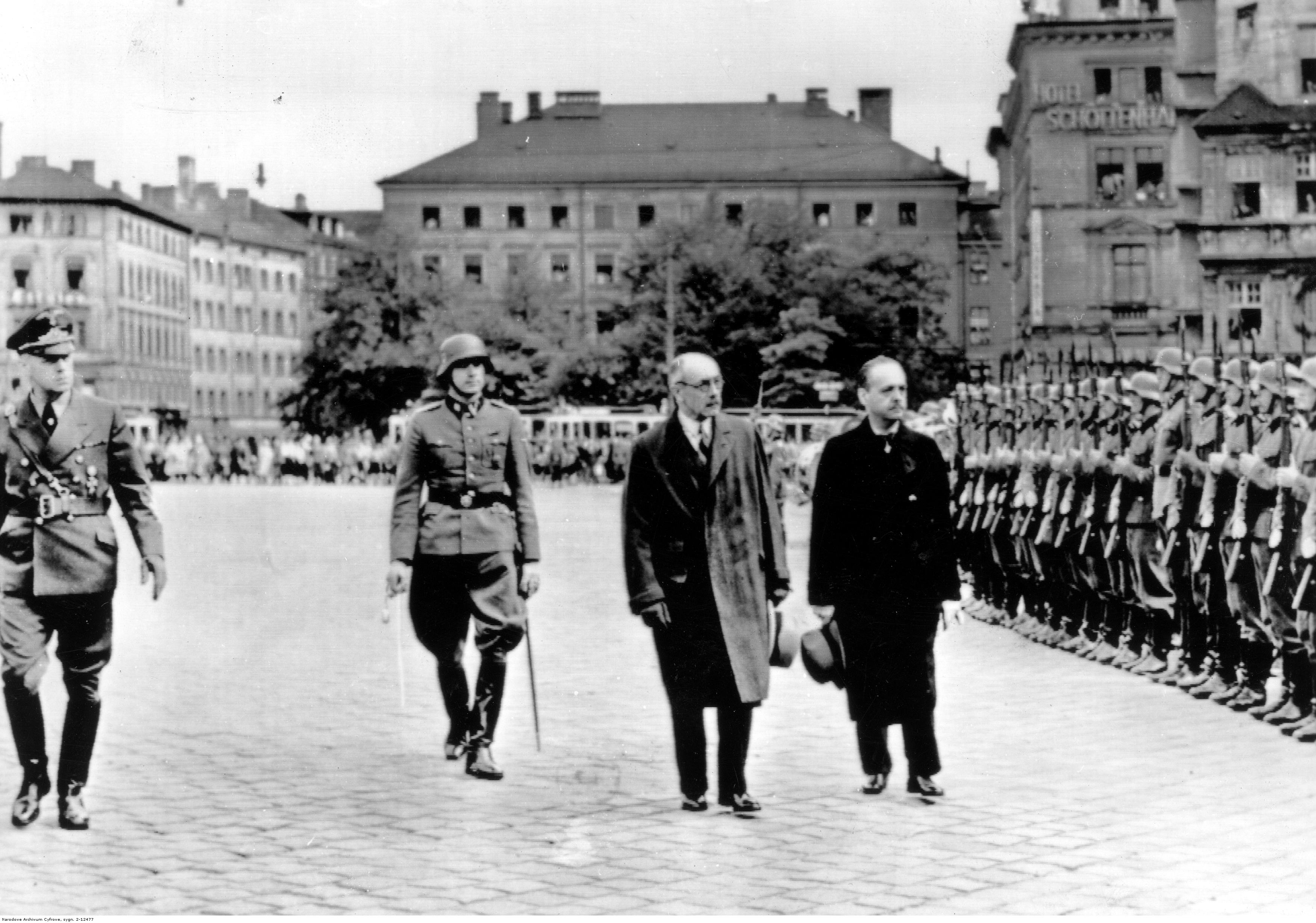 El ministro de Asuntos Exteriores de Hungría, Istvan Csaky (derecha) y el primer ministro húngaro, Pal Teleki (segundo por la derecha), pasando revista a la guardia de honor en Múnich. A la izquierda el ministro de Relaciones Exteriores del Reich, Joachim von Ribbentrop.